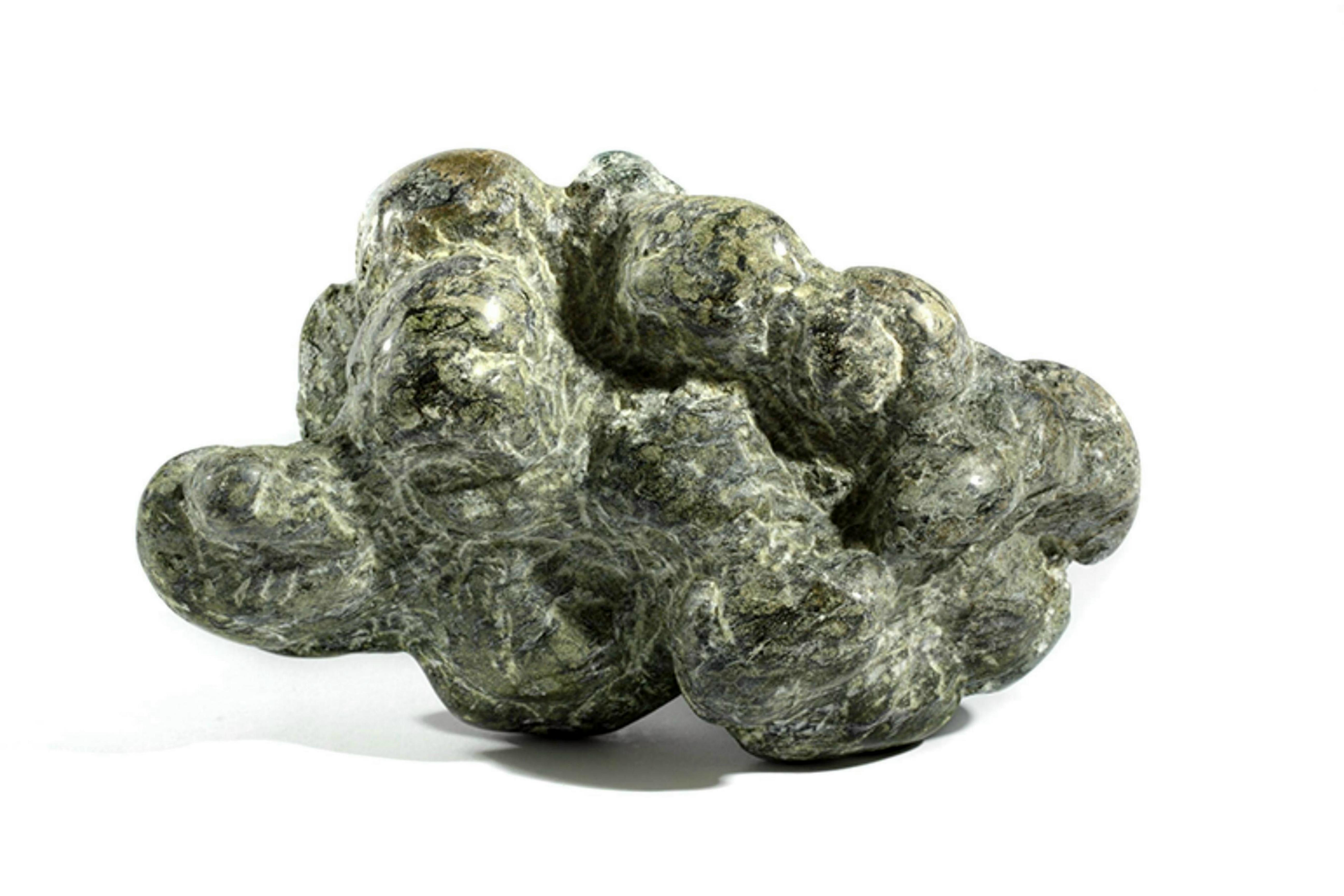 Dunkle Wolke (Eva Backofen)